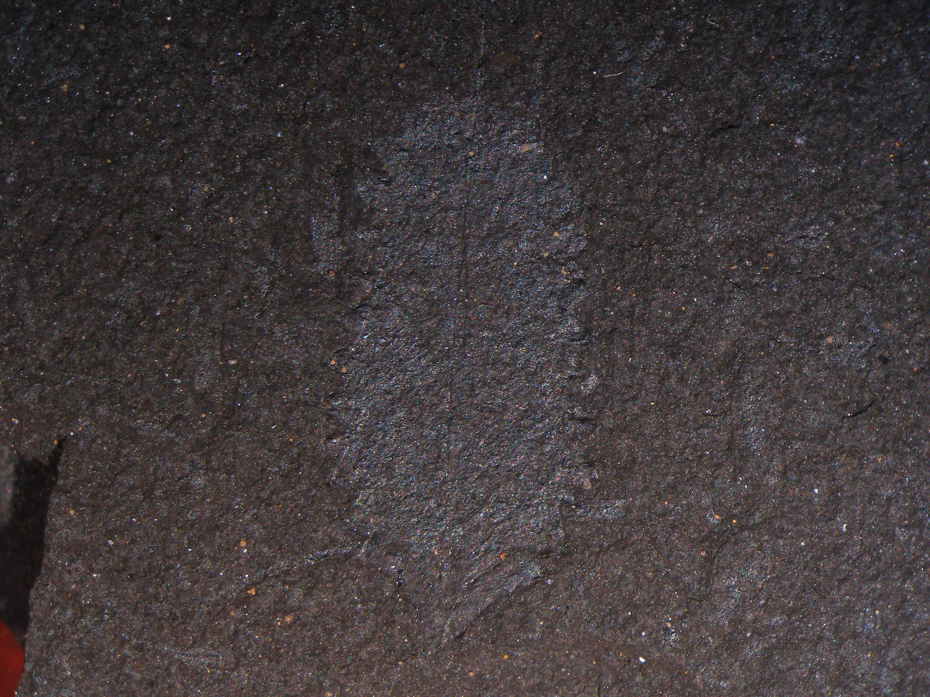 Spodno silurský biseriální graptolit Pethalolitus ovatoelongatus.